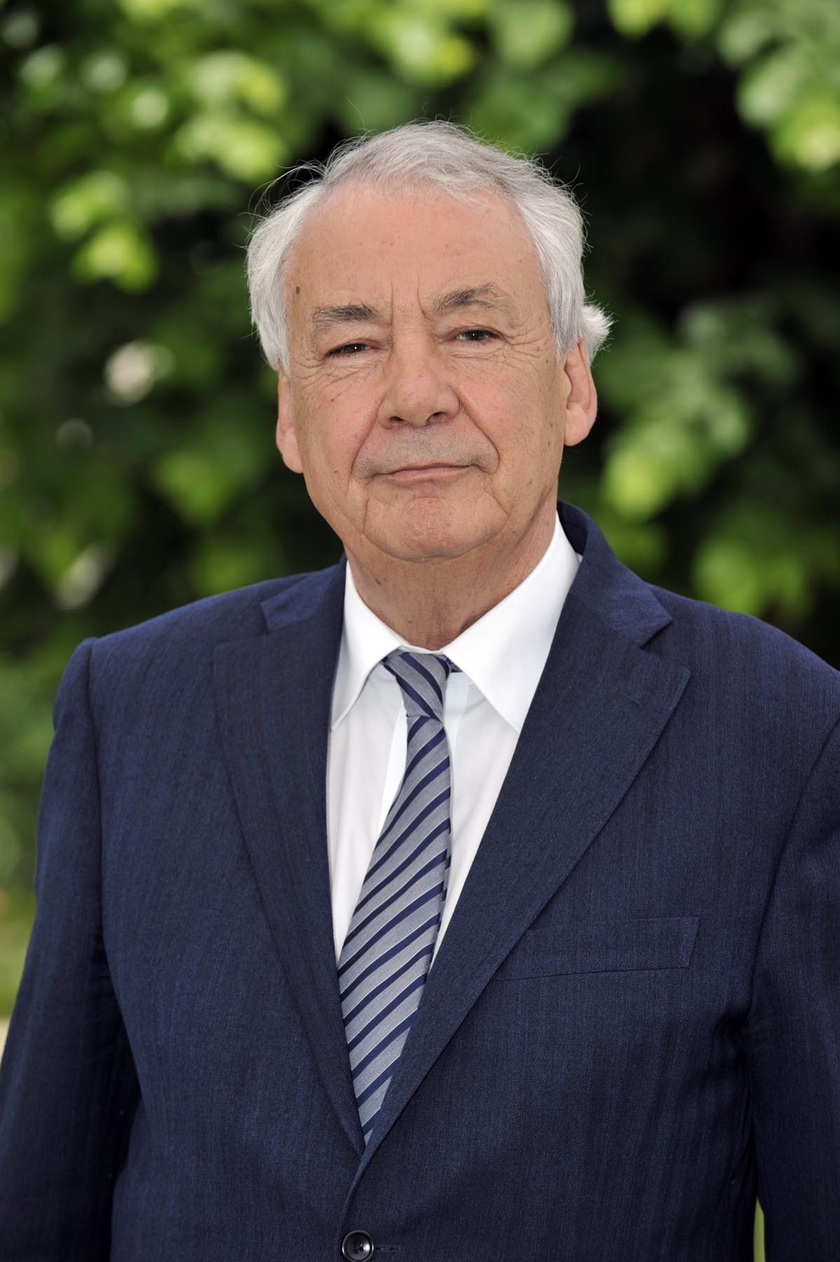 Maire de Nantes, depuis le 29 juin 2012.